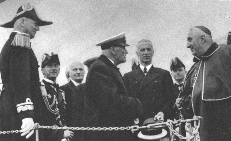 Ignacy Mościcki rozmawia z bp Stanisławem Okoniewskim na pokładzie ORP "Mazur", w czasie "Dni Morza" w Gdyni. Z lewej adm Józef Unrug.